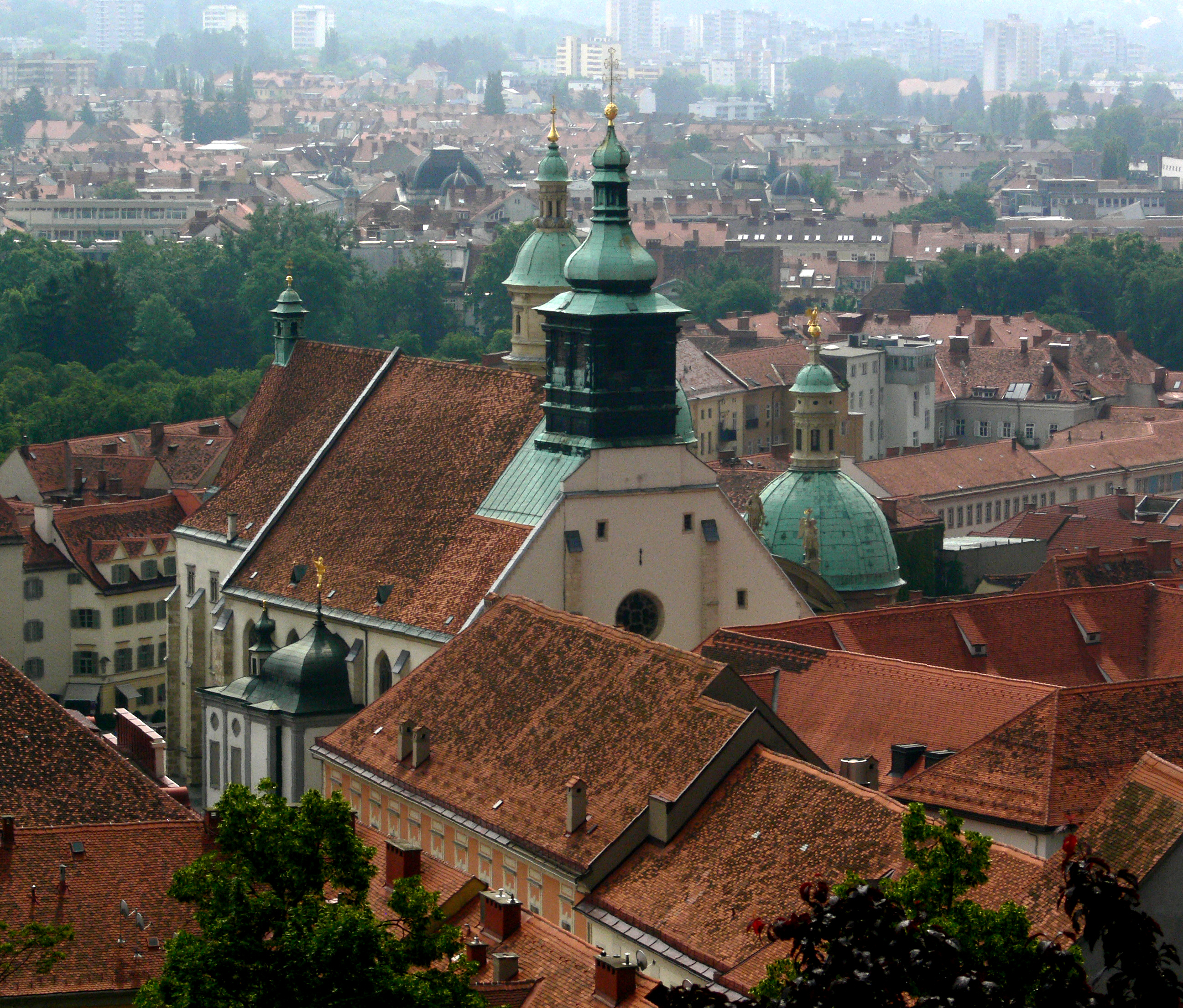 Grazer Dom und Mausoleum, Ansicht vom Schlossberg